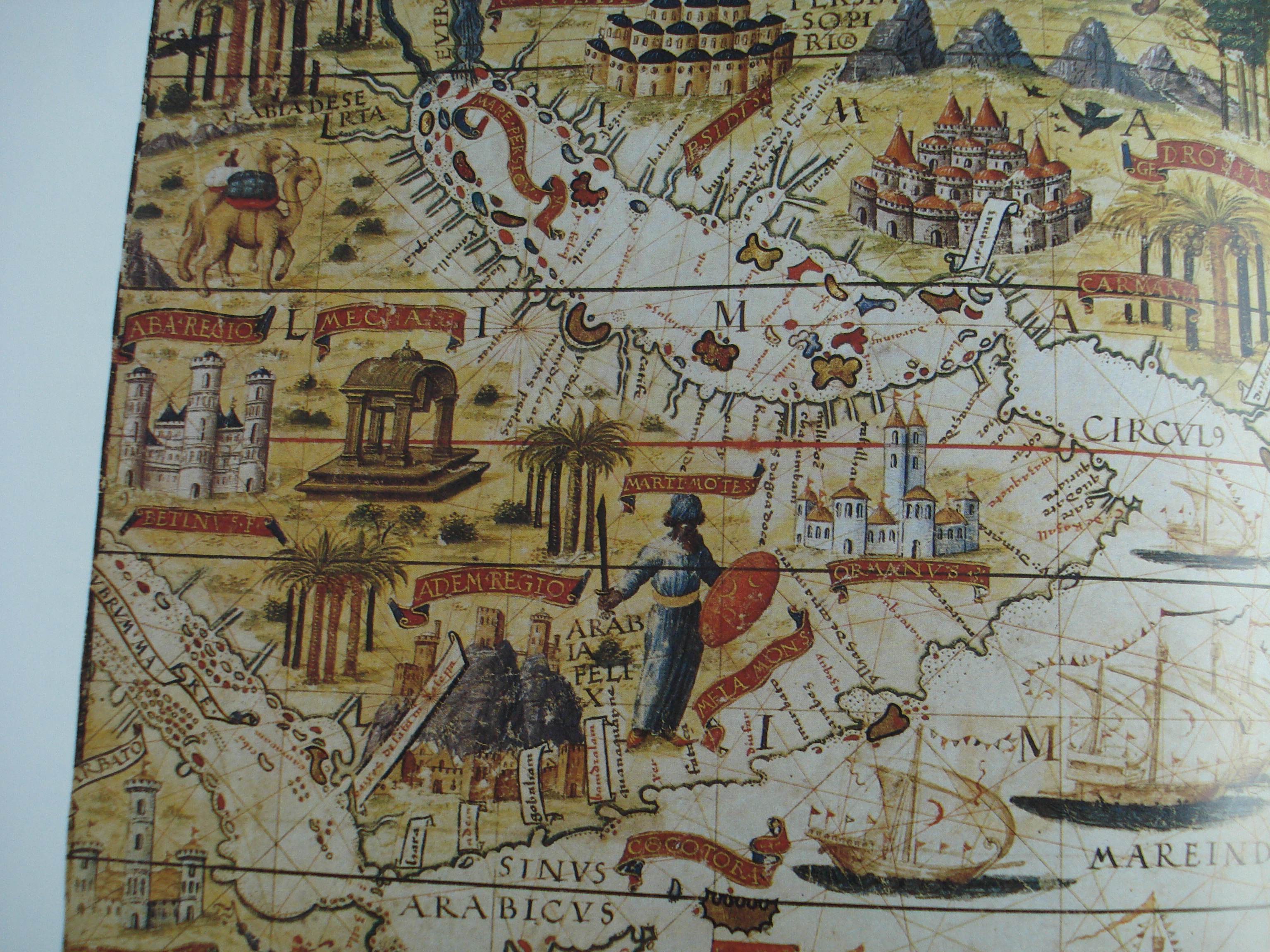 خرائط تاريخية قديمة مصدر: مخازن مكتبة جامعة بريمين تاريخ: خرائط تعود للقرون الرابع عشر إلى أوائل القرن العشرين نوع: تصوير كاميرا رقمي